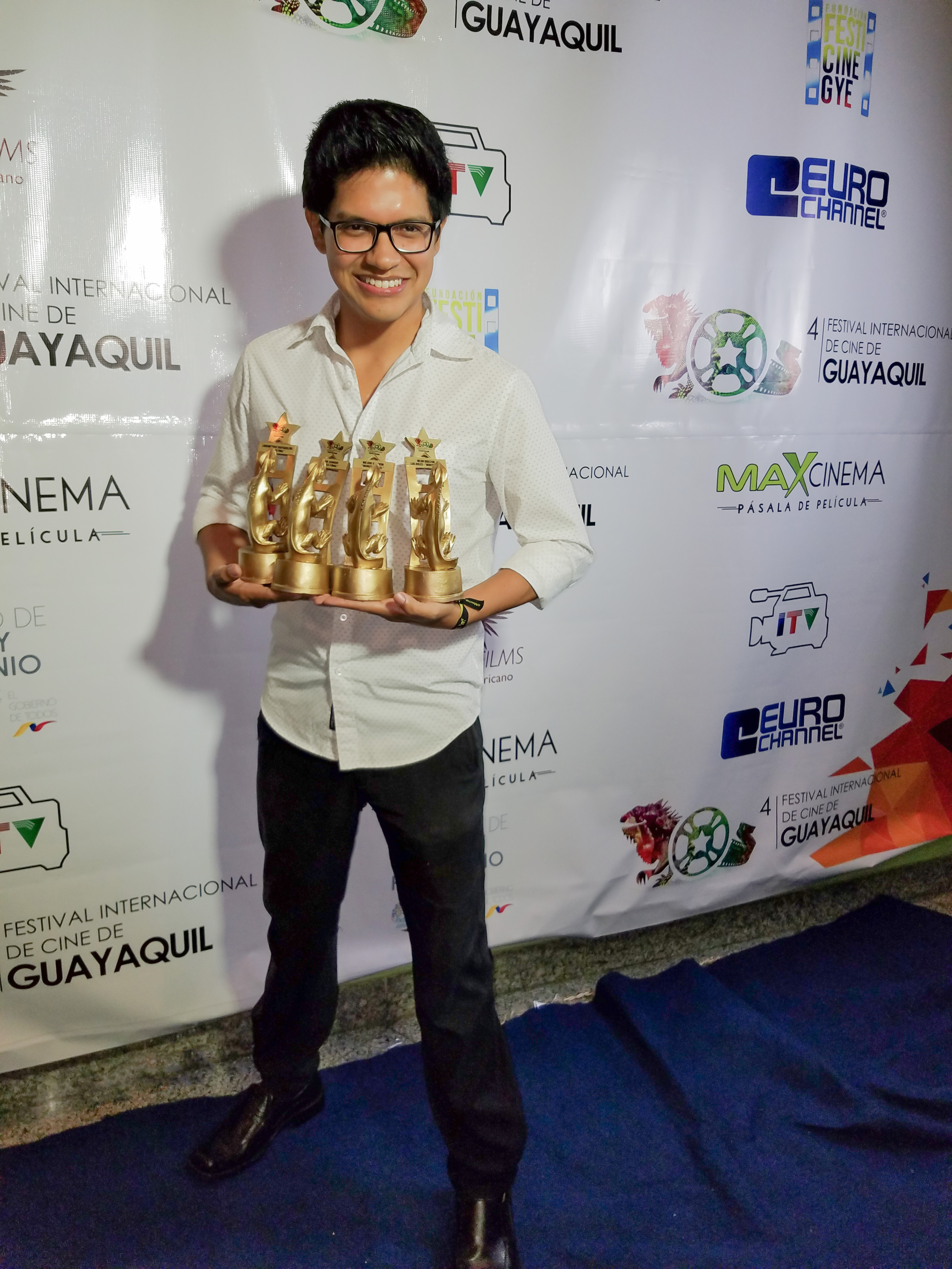 Luis Avilés con 4 Iguanas Doradas del Festival Internacional de Cine de Guayaquil de 2018.